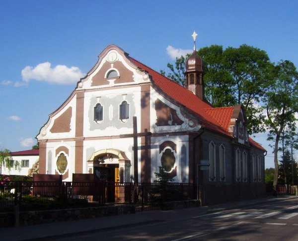 Kościół pw. Najświętszego Serca Pana Jezusa w Orzyszu